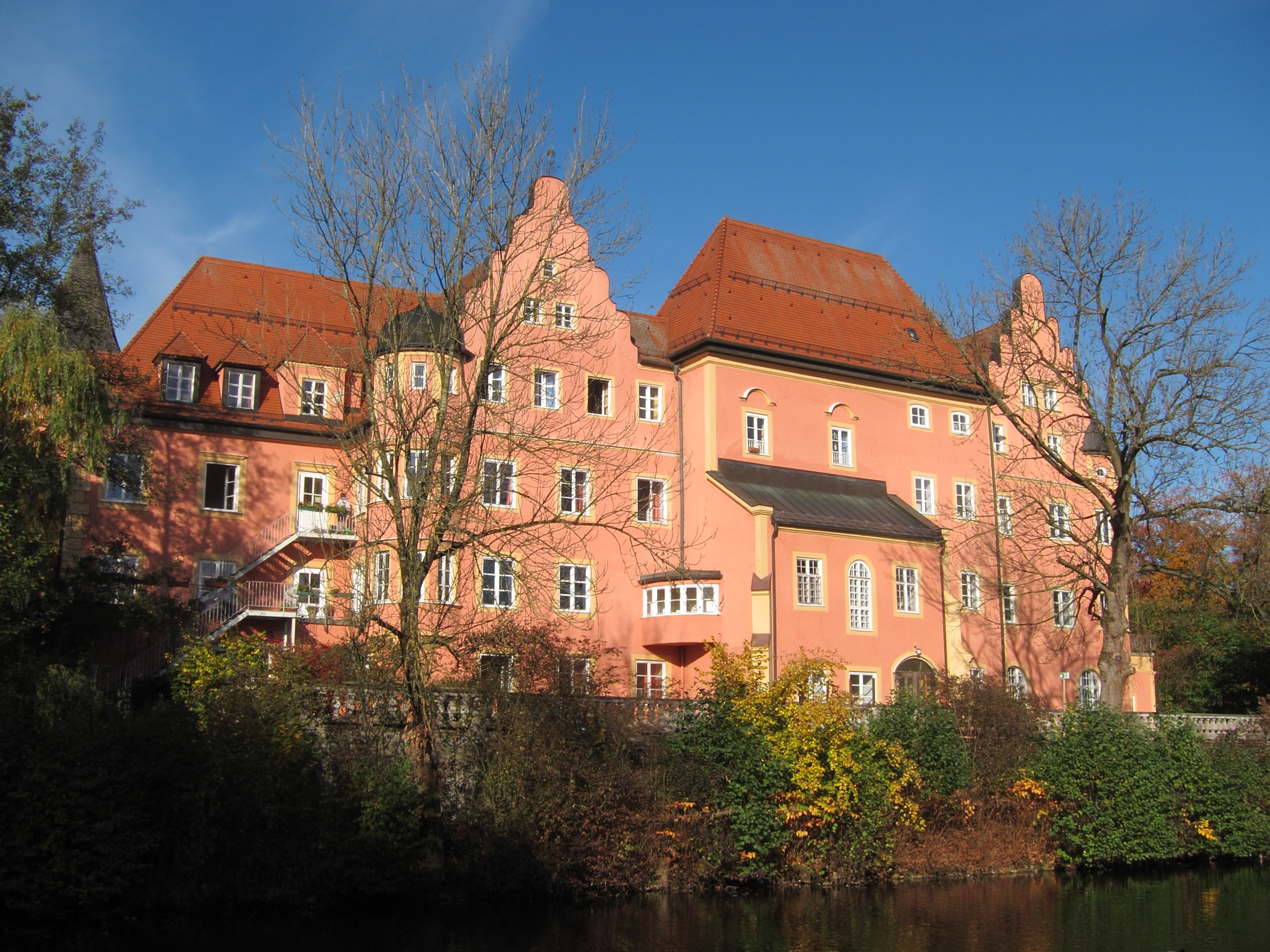 Ehemaliges Wasserschloss; dreigeschossiger Hauptbau mit Schlosskapelle, Ecktürmen, Schweifgiebeln und flankierenden Pavillons, im Kern 16./17. Jahrhundert, 1898 Umbau in Neurenaissanceformen; mit Ausstattung; Terrasse; Schlossbrücke über den Wassergraben, im Kern vor 1800.